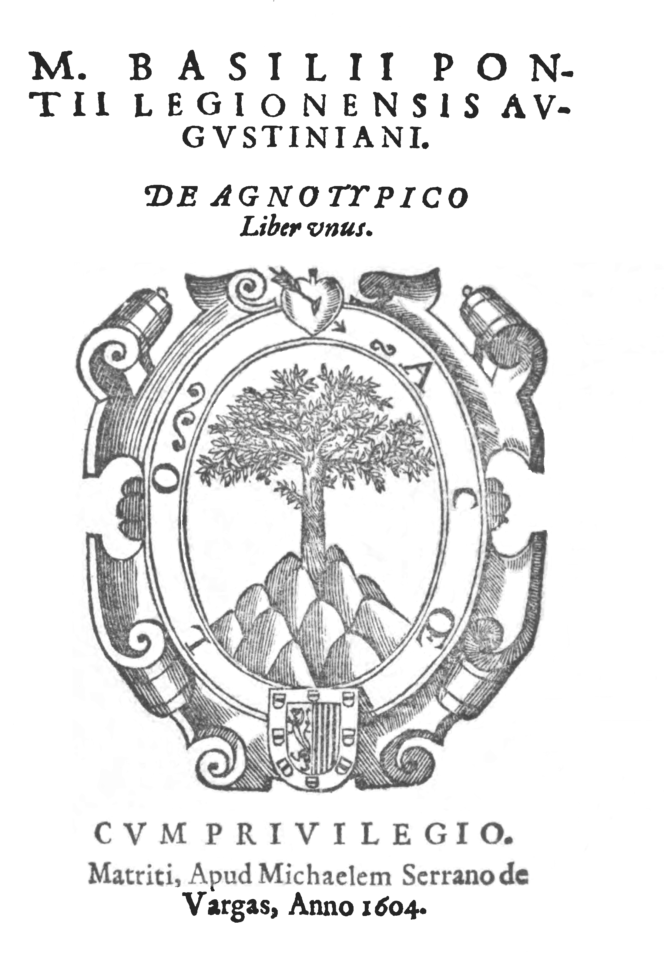 Portada del libro de tipo religioso "De agno typico. Liber unus", publicado en Madrid por Basilio Ponce de León en 1604.